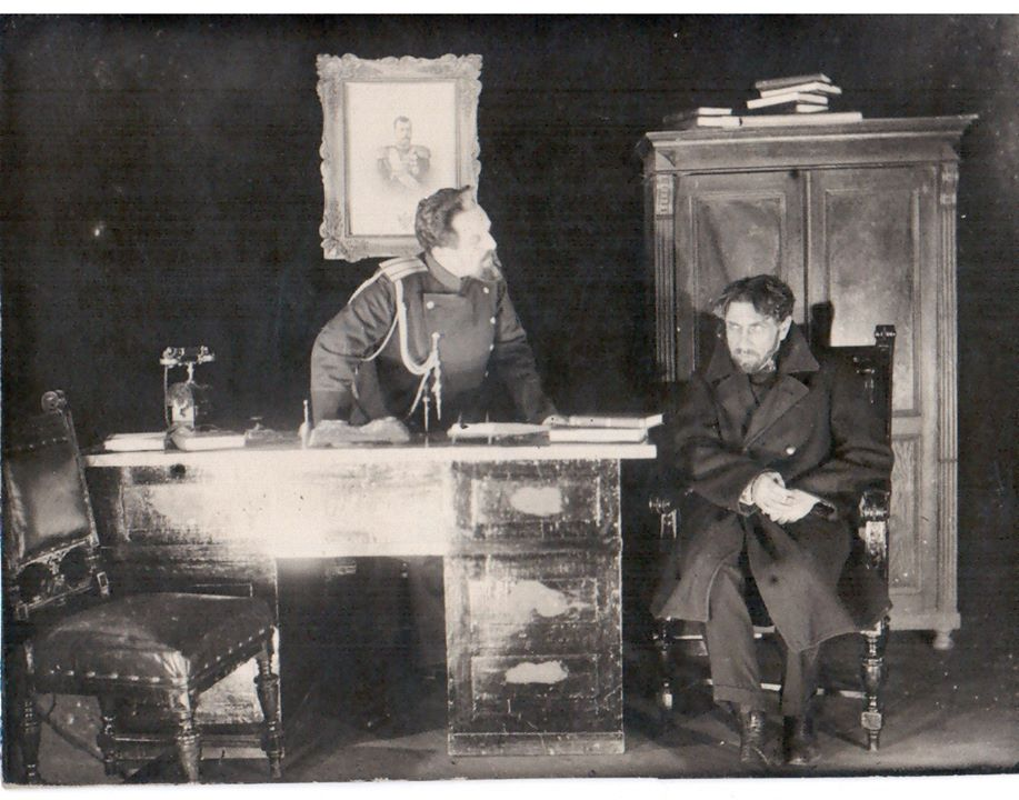 Сцена з першої вистави франківців